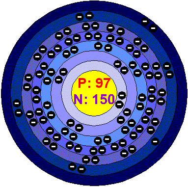 Берклий атомы